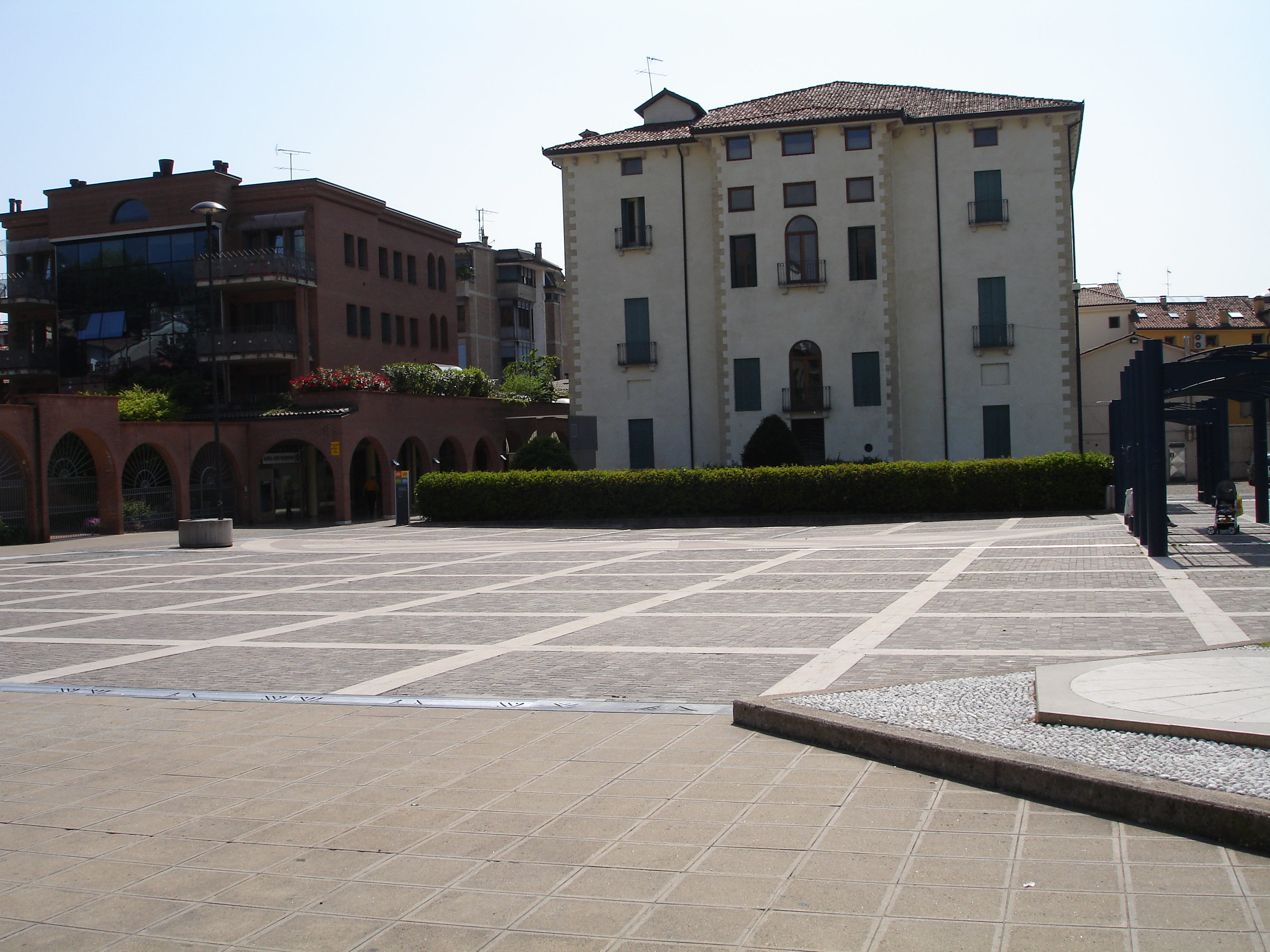 Schio, Piazza Falcone Borsellino This is a photo of a monument which is part of cultural heritage of Italy.